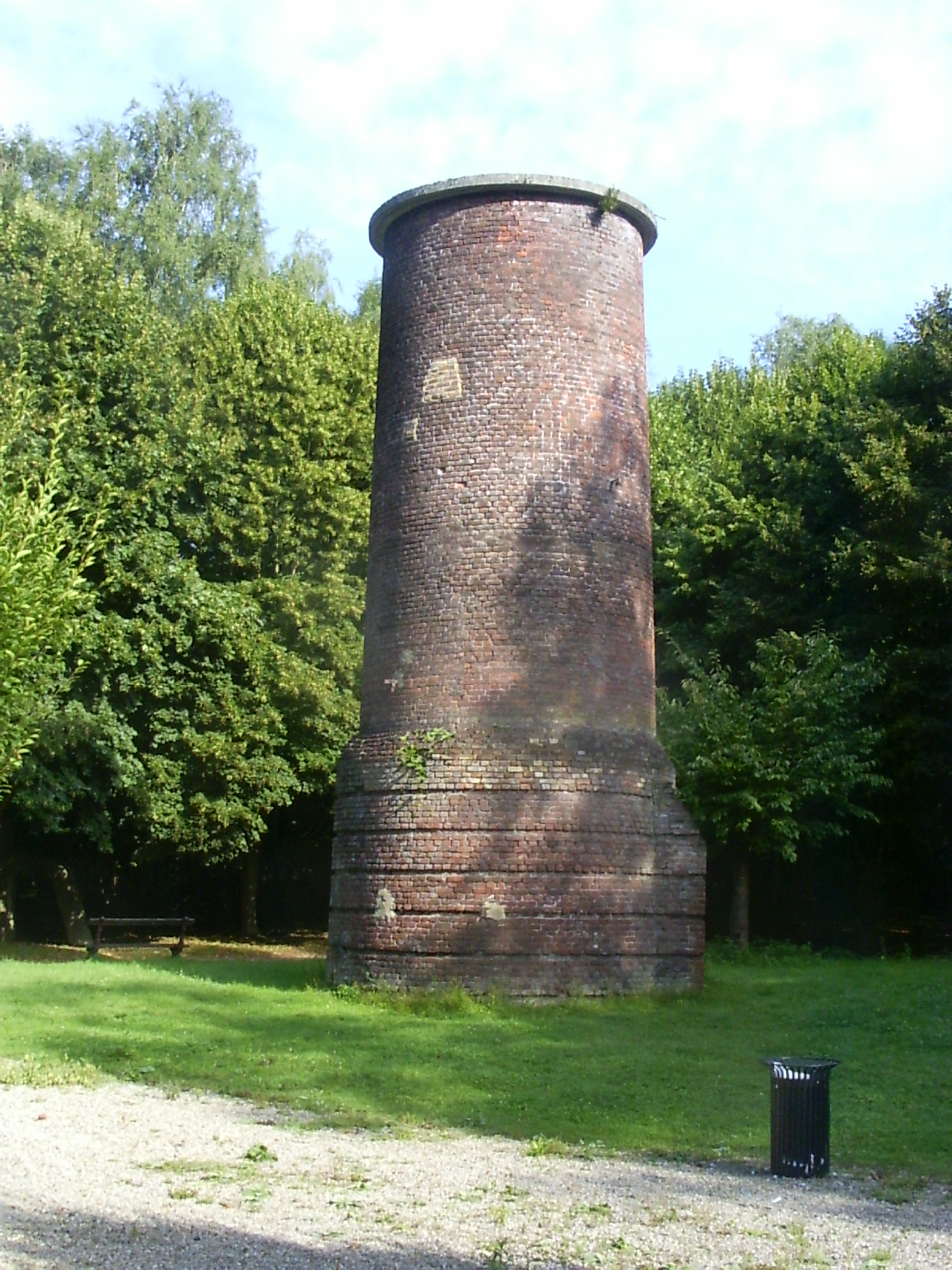 Oignies, industrieel erfgoed van de ruitenfabriek